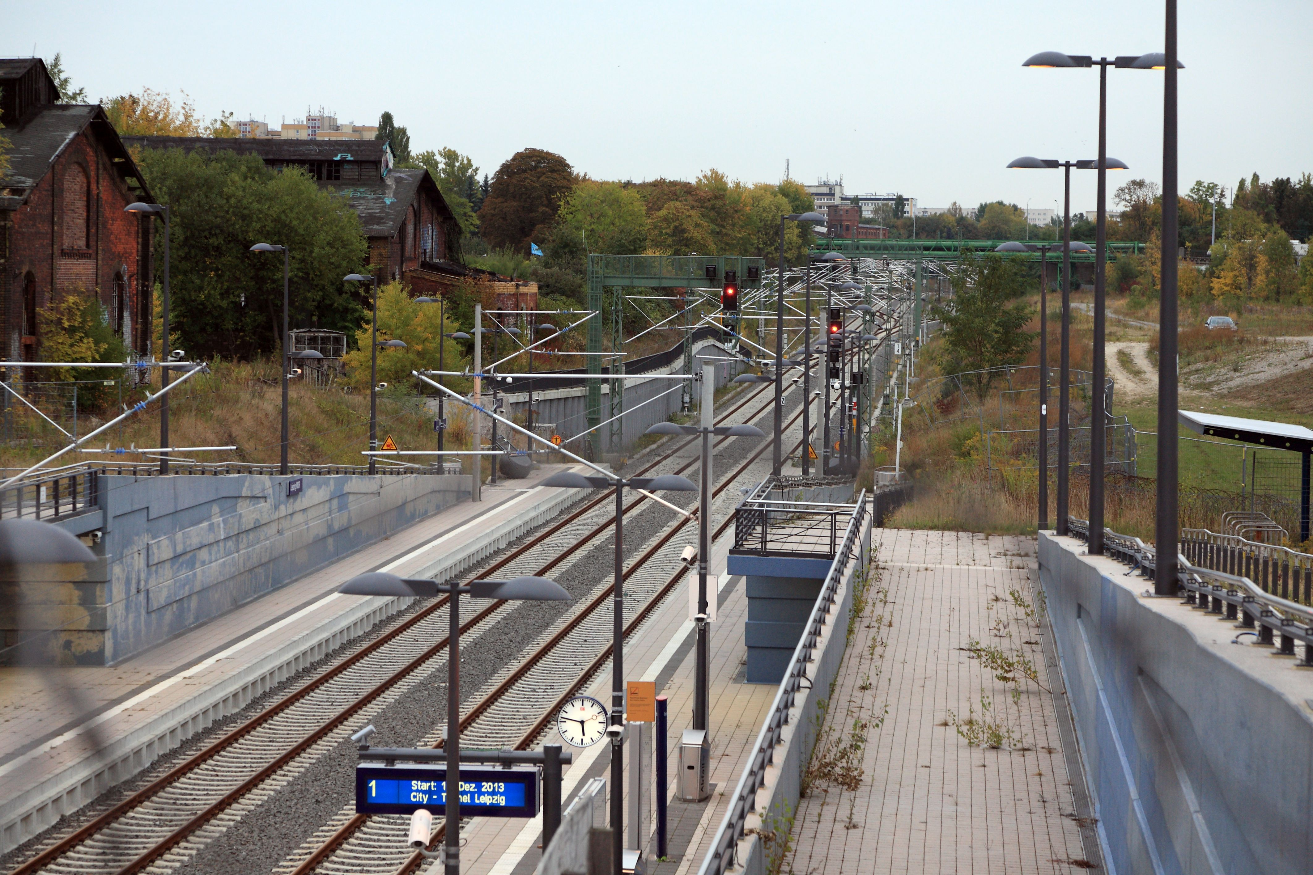 Man sieht, dass die Anlage schon vor vier Jahren fertiggestellt wurde. Das Unkraut wächst und gedeiht. Trotz Zäunen und martialischem Stacheldraht kommen die Sprüher auch weiterhin rein.